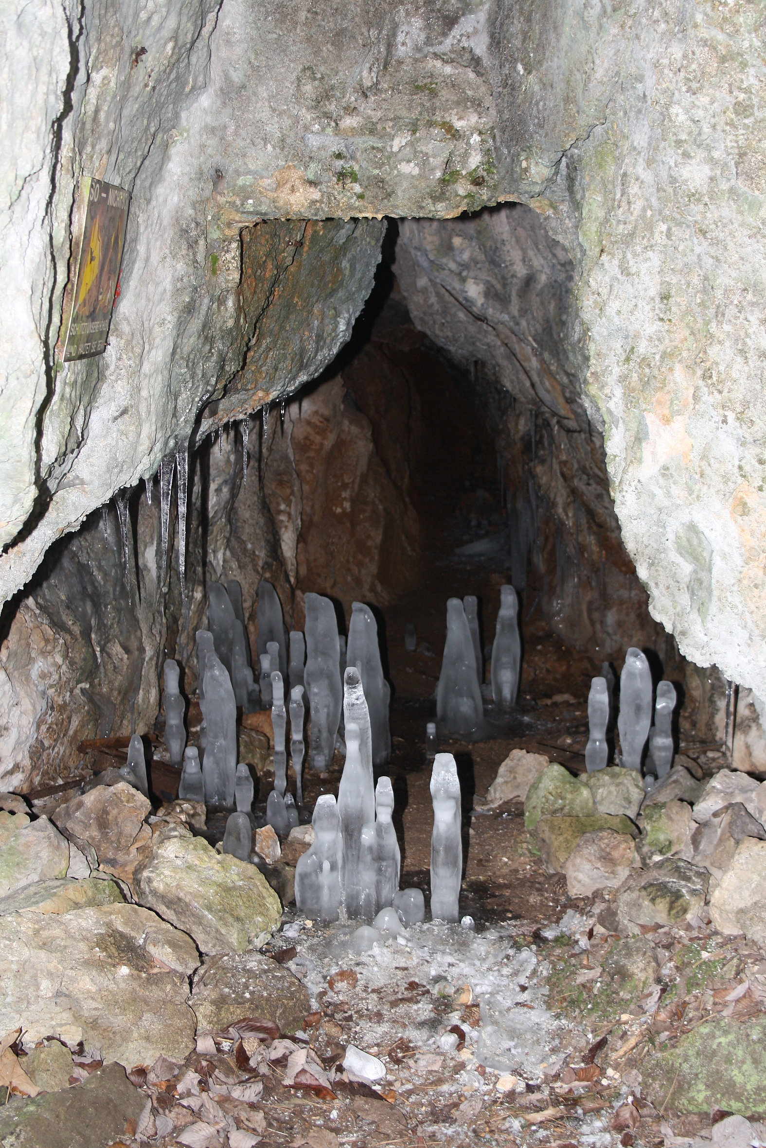 Eisstalagmiten beim Eingang der begehbaren Waldegger Tropfsteinhöhle am Waldeggersteig, der über die Große Klause auf das Plateau der Hohen Wand in Niederösterreich führt. Die Höhle ist rund 20 m lang, bis zu 6 m hoch und trägt die Katasternummer 1863/24.